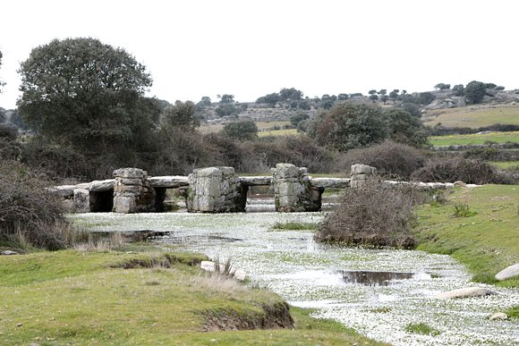 Puente El Rebollar, de origen romano o tardo-romano, en Almeida de Sayago, Zamora, España.